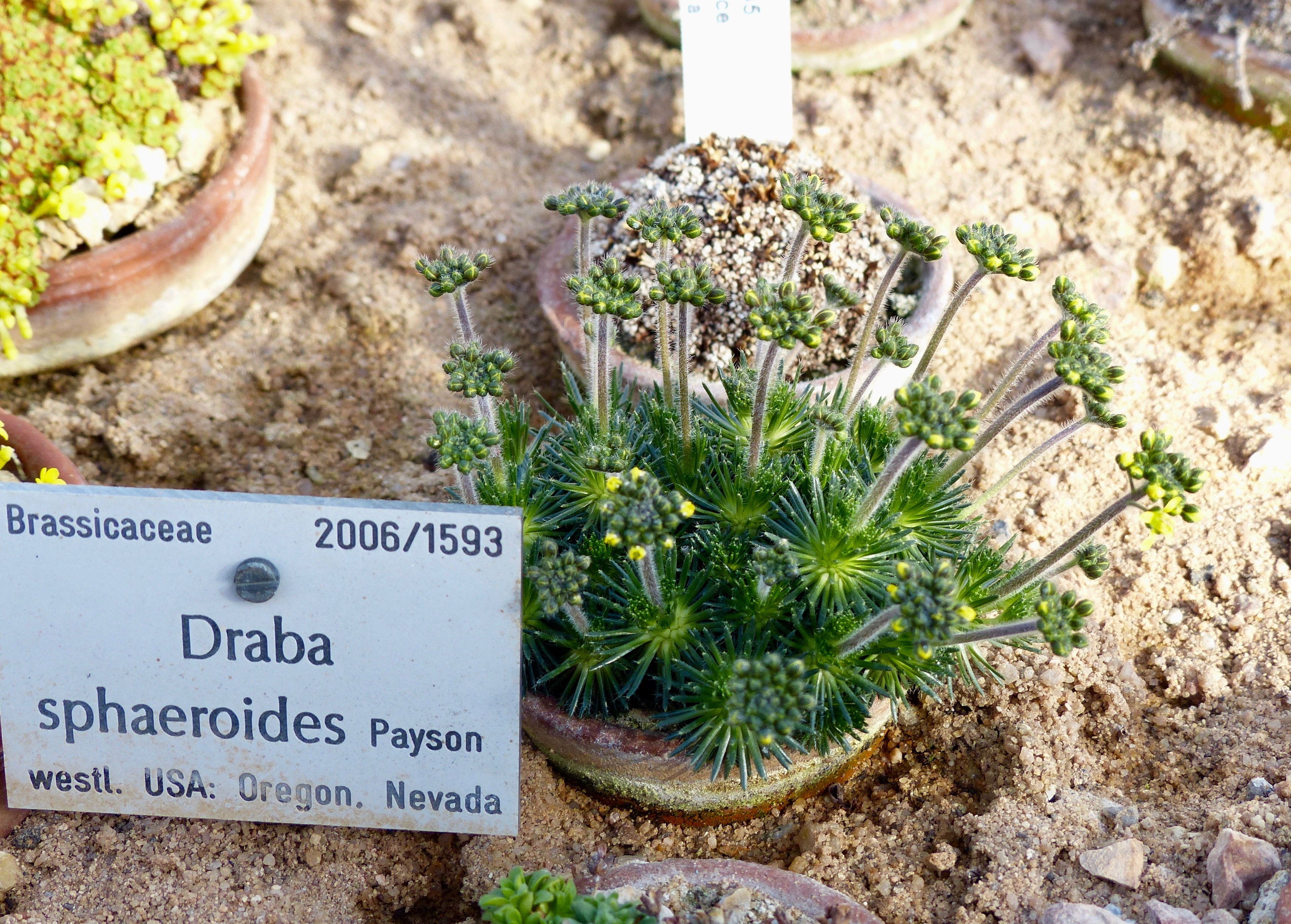 Führung und Fotoexkursion in den Botanischen Garten München-Nymphenburg im Rahmen des WikiAlpenforums: Draba sphaeroides im Anzuchtgewächshaus